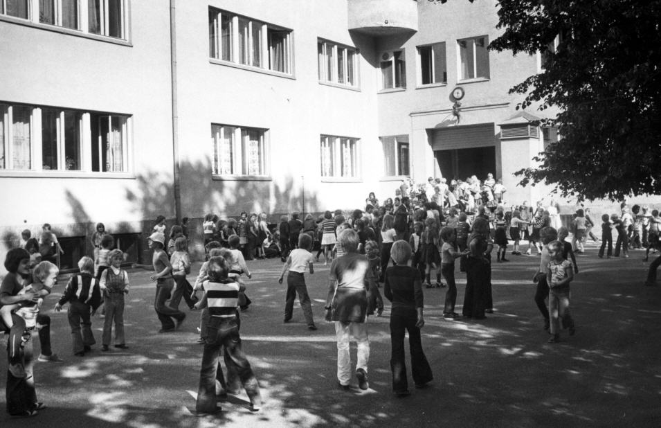 Kuva on peräisin Helsingin Saksalaisen koulun alumnien arkistosta. Se esittää koulun pihaa vuonna 1970.